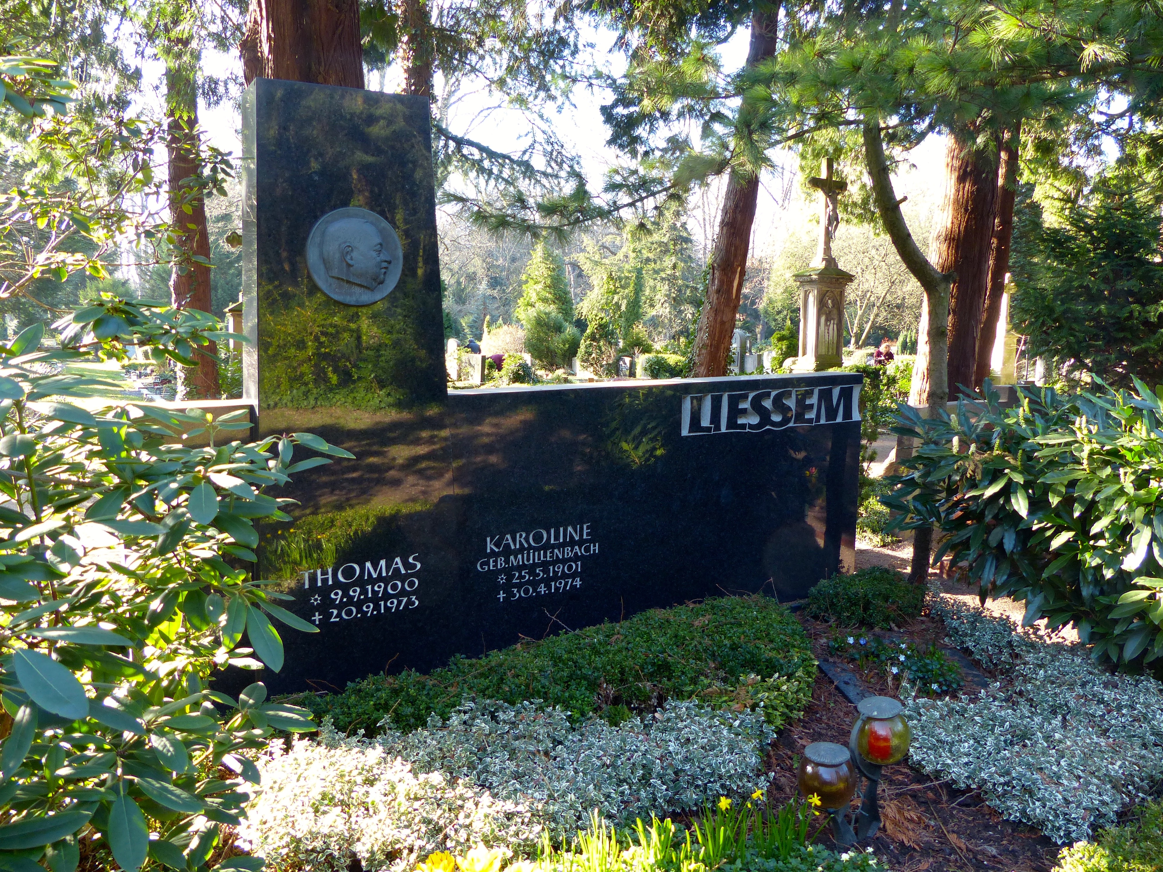 Grabstelle auf dem Melaten-Friedhof: Thomas Liessem (* 9. September 1900 in Köln; † 20. September 1973 ebenda) war einer der einflussreichsten Karnevalisten und Organisatoren im Kölner Karneval.